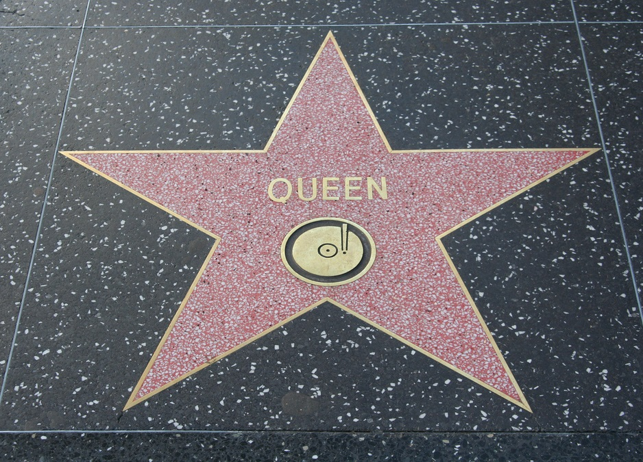 Etoile de Queen sur le Walk of Fame